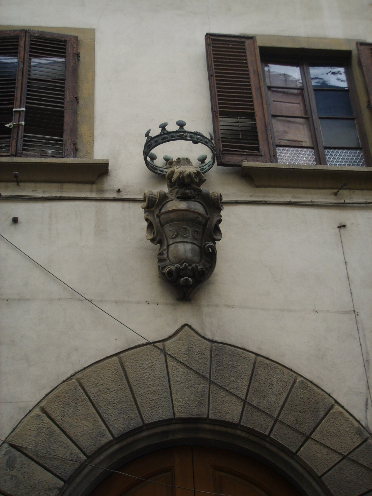 Palazzo salviati- quaratesi, stemma strozzi nella casa adiacente